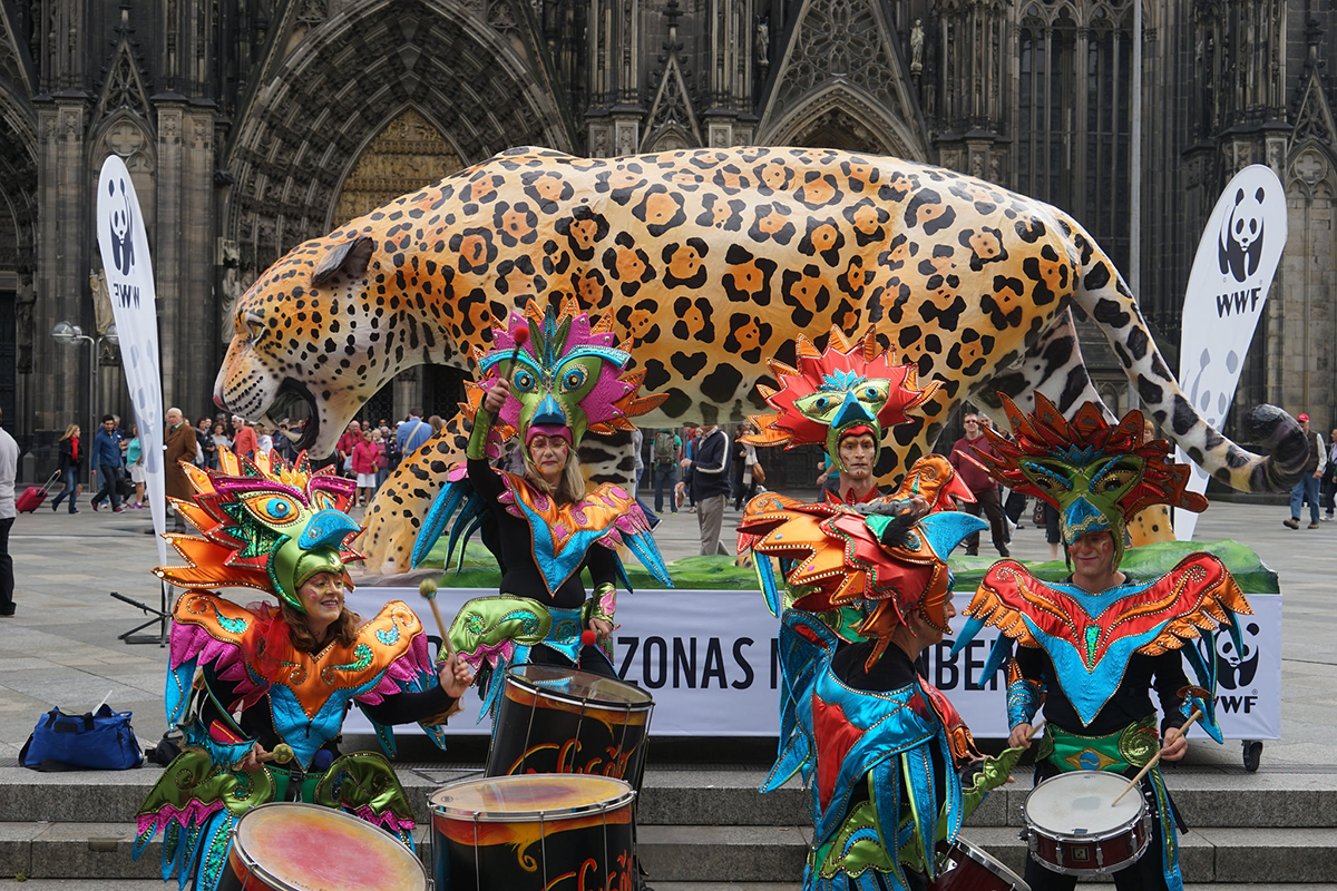 WWF Amazonastag vor dem Kölner Dom mit Confusao / Bremen